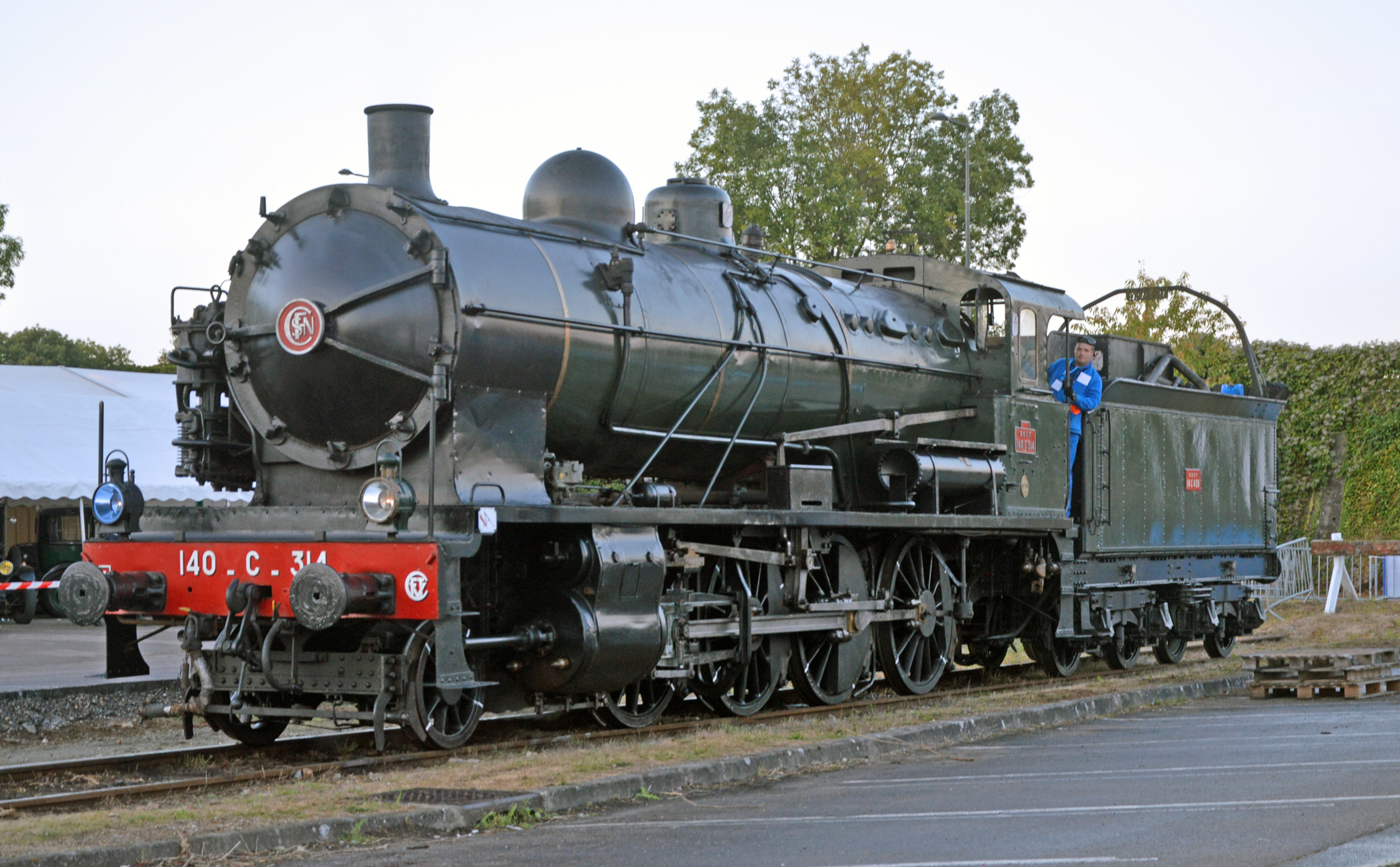 140C314 lors de la 3ème fête du rail a Longueau en 2016